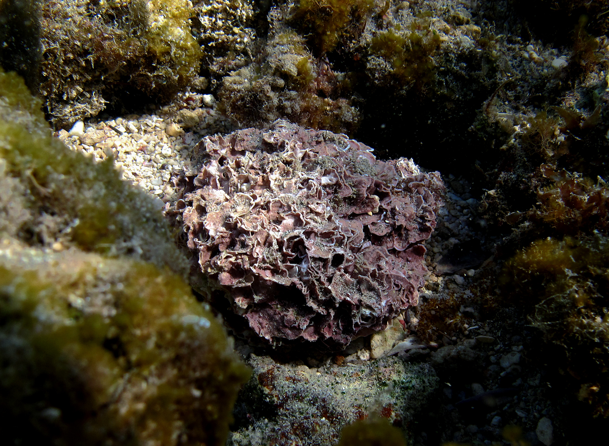 Une algue encroûtante de la famille des Corallinaceae à la Réunion.